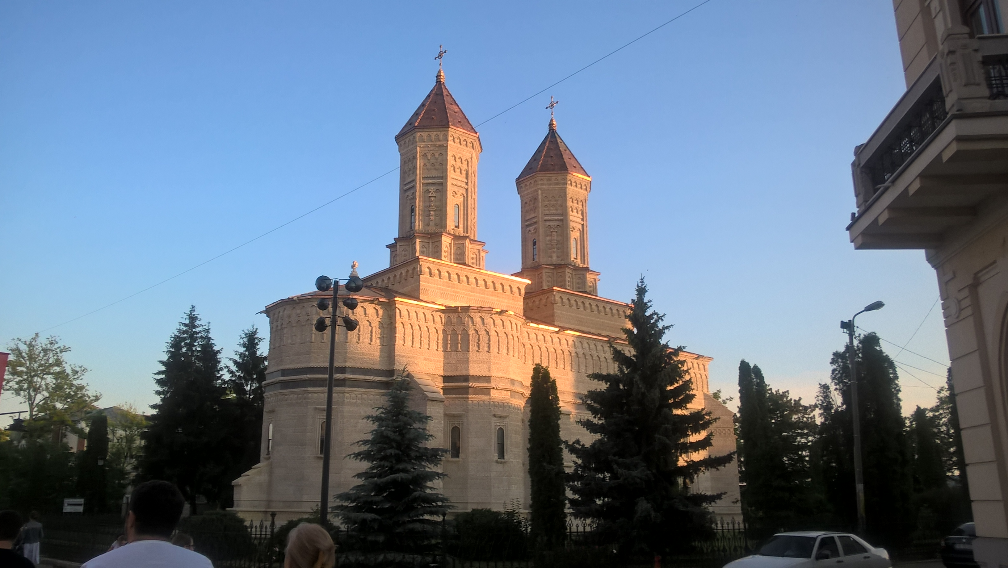 Cerkiew Trzech Świętych Hierarchów w Jassach widziana od strony północno-wschodniej